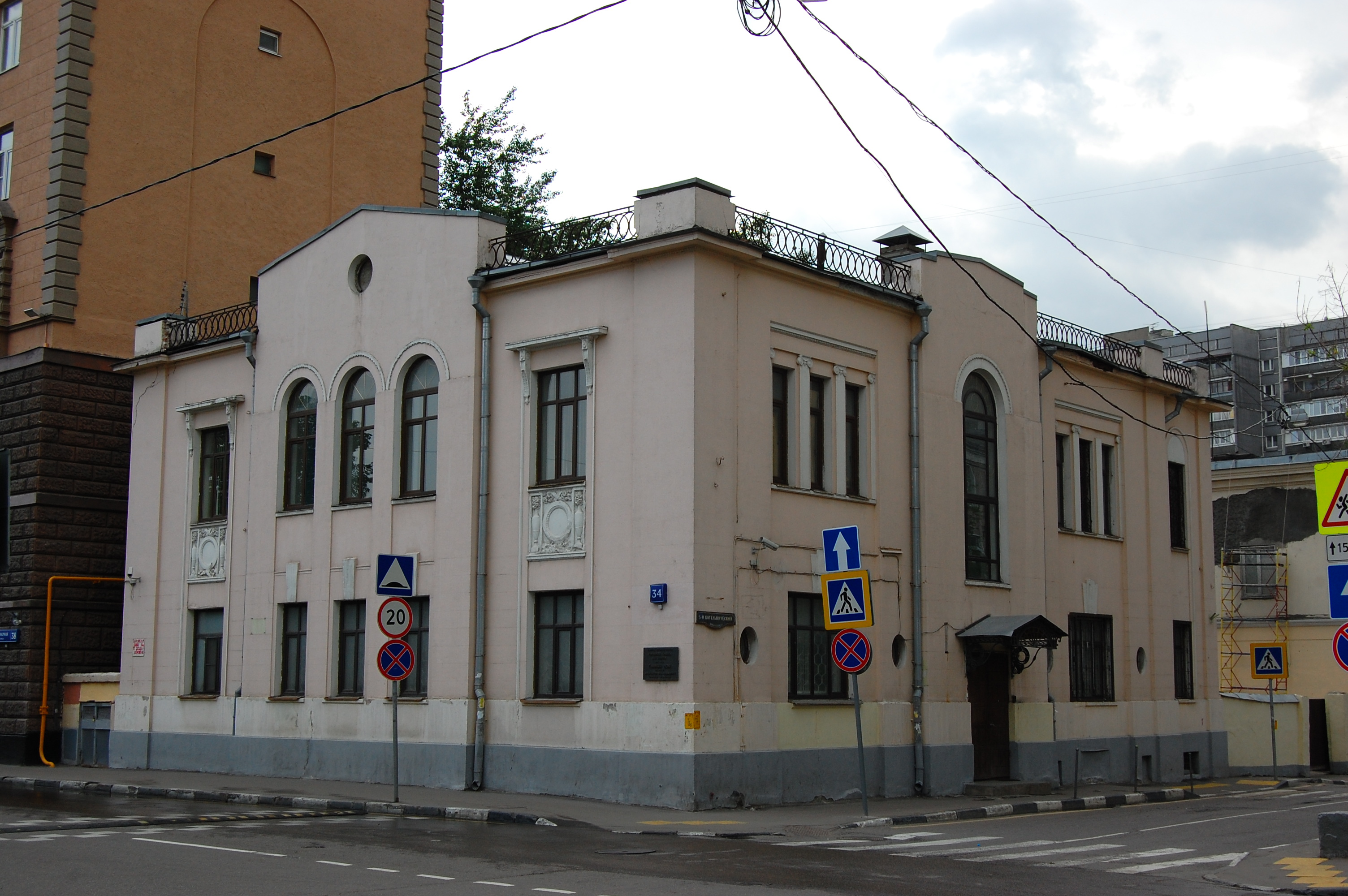 Городская усадьба А. И. Зимина, общий вид